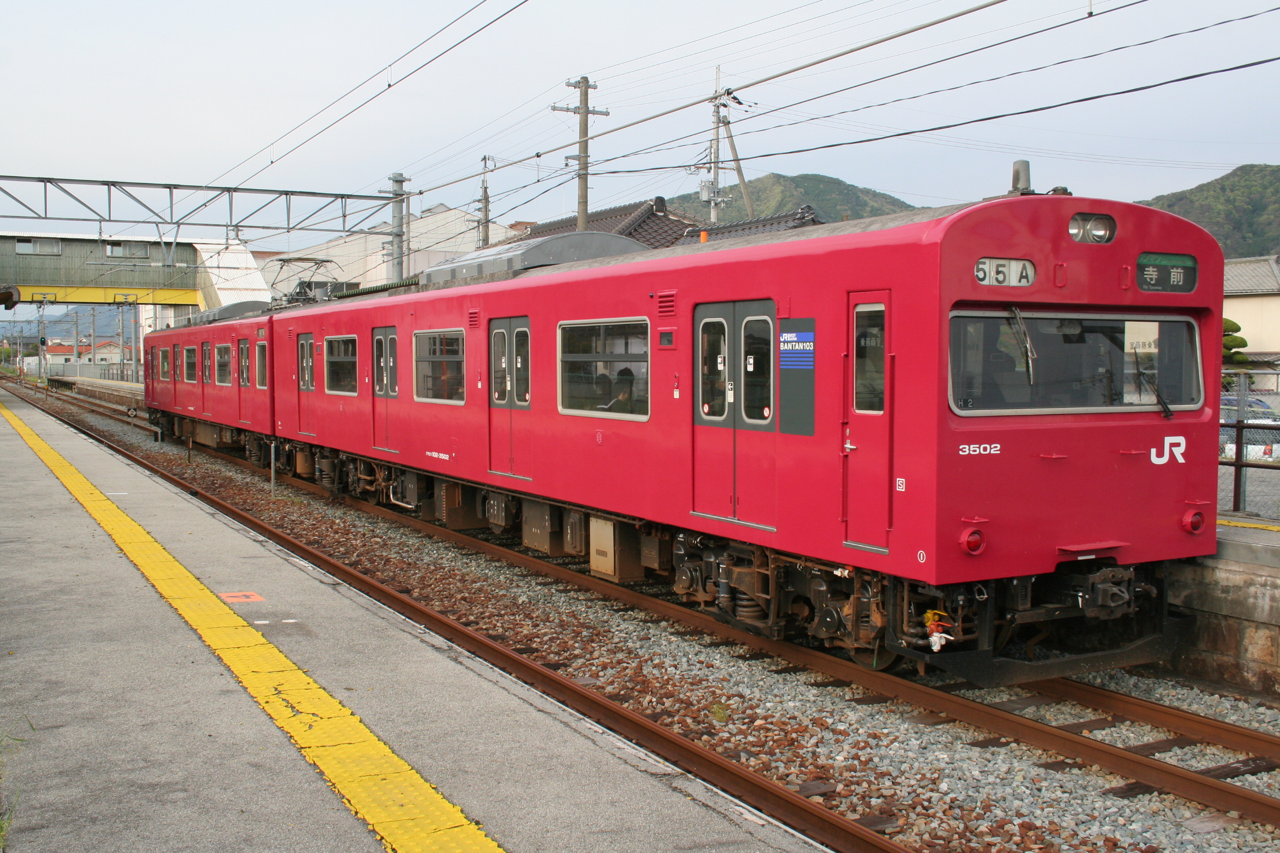 鶴居駅。JR西日本の鉄道路線の一つ、播但線にある鉄道駅。 1番線に停車する播但線の列車。